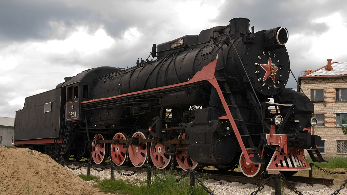 Памятник Л-5218 у станции Микунь